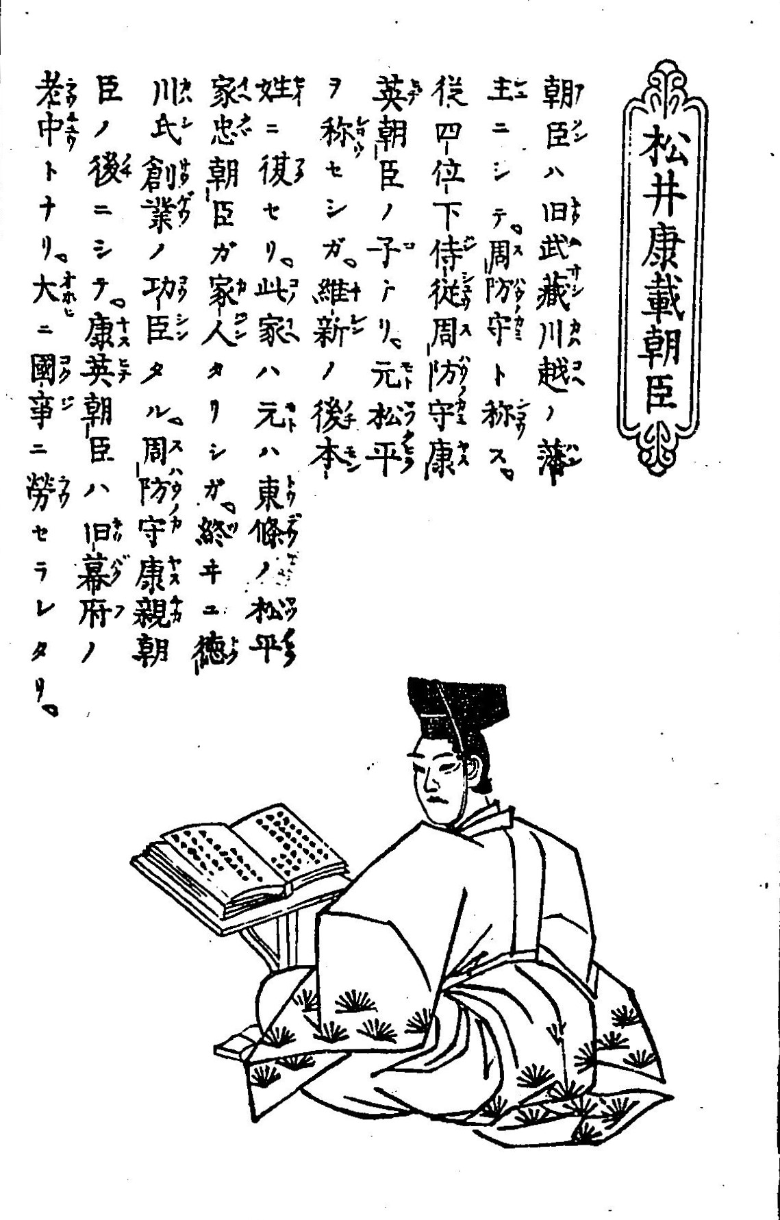 武蔵川越藩最後の藩主・松平康載(戸田央・板倉勝観)の肖像画。